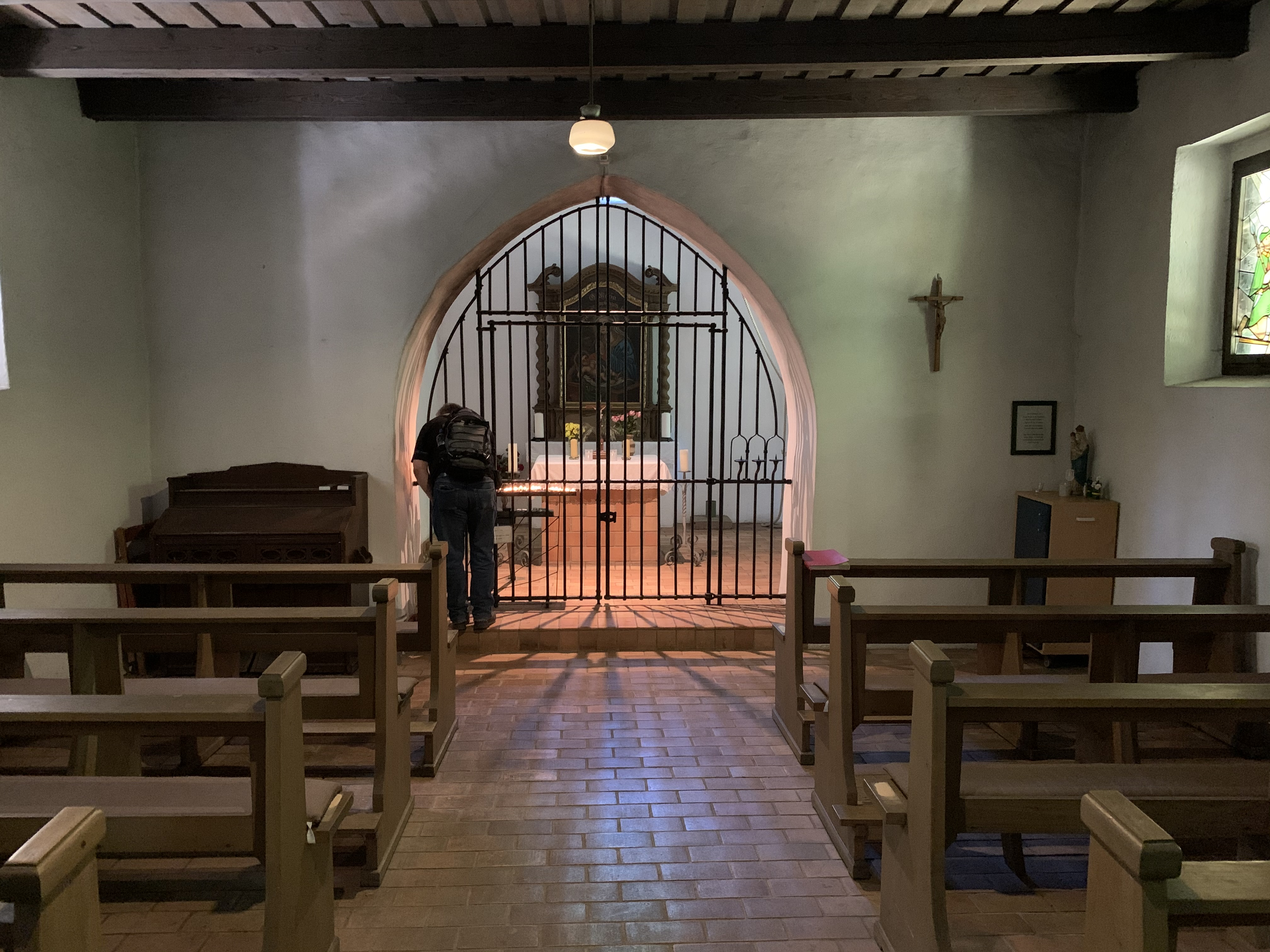 Kransberg Marienkapelle auf dem Holzberg, Innen